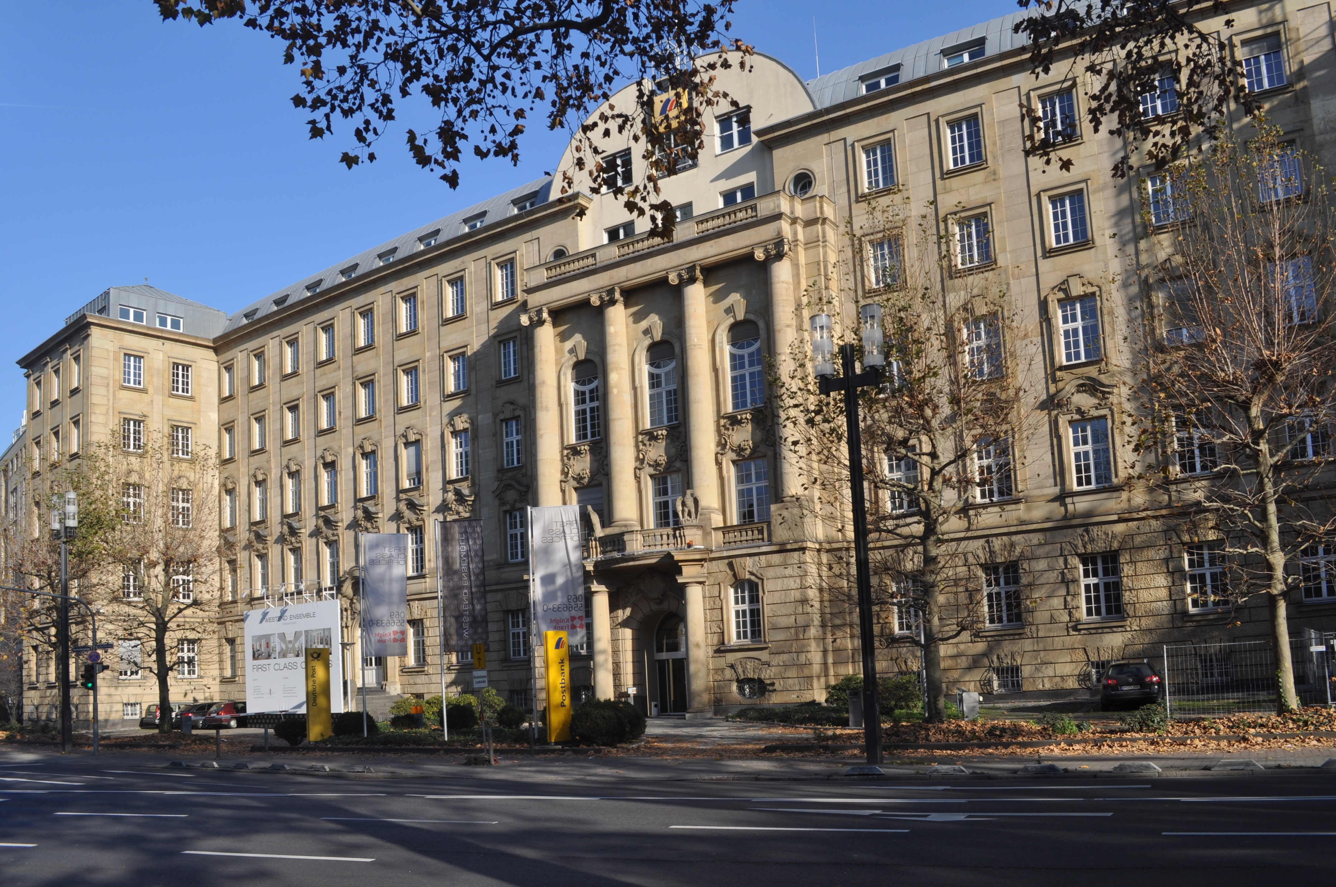 Denkmalgeschütztes Gebäude der ehemaligen Oberpostdirektion in Frankfurt